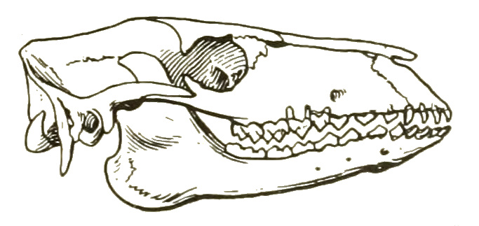 Protylopus petersoni skull